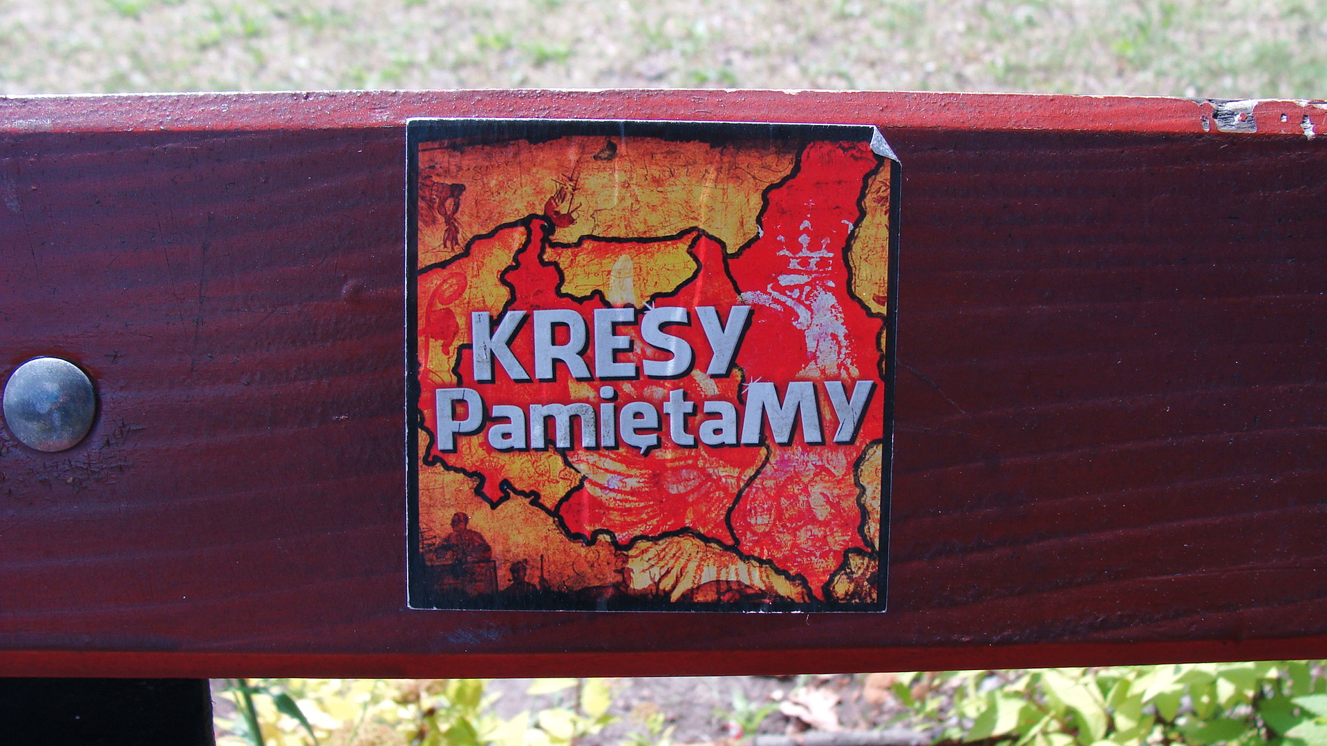 Wlepka "Kresy pamiętamy" na ławce w mieście Sulejówek.